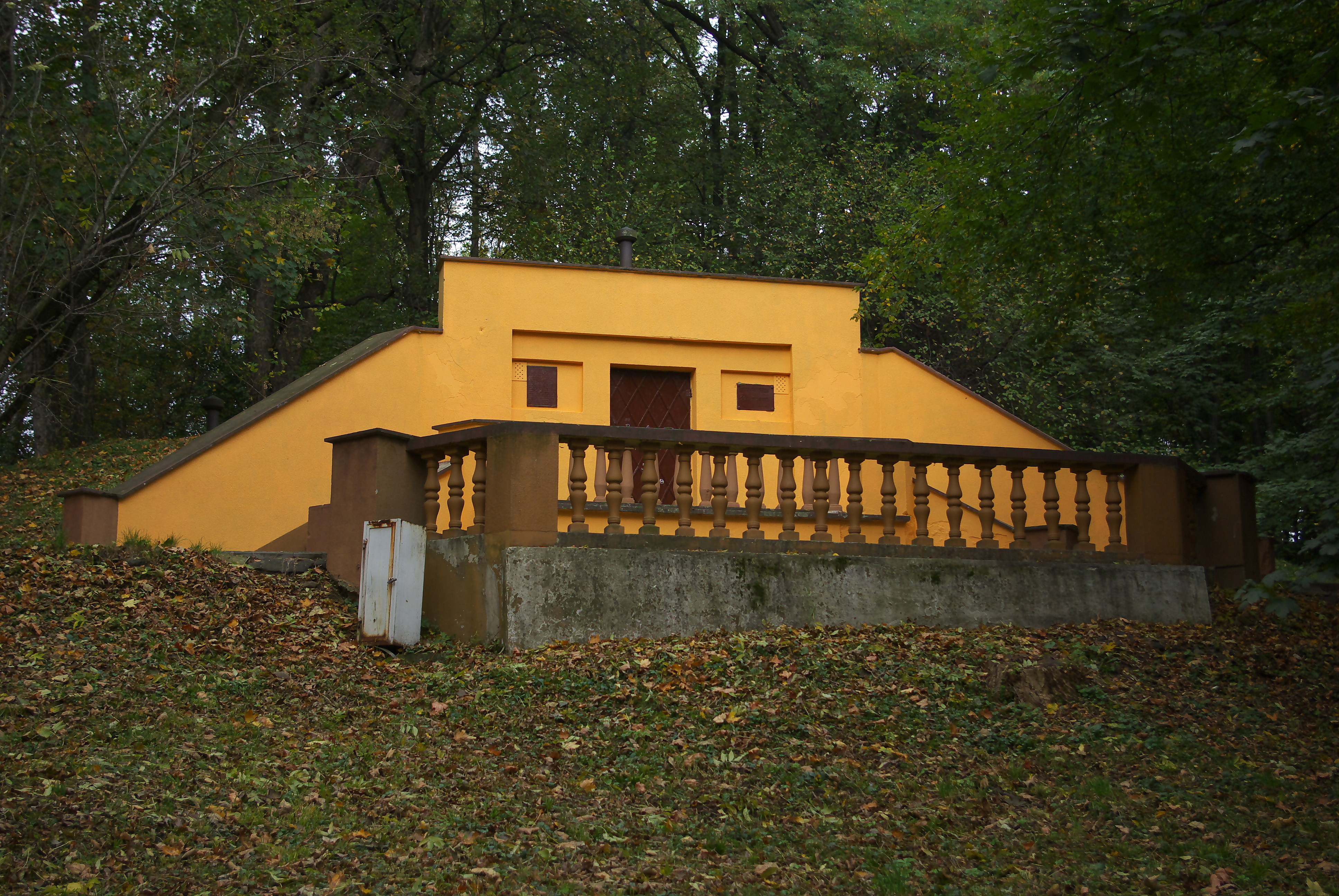 Budynek zbiornika retencyjnego wodociągów miejskich w parku miejskim im. Adama Mickiewicza w Sanoku. Odmalowany we wrześniu 2012 roku.